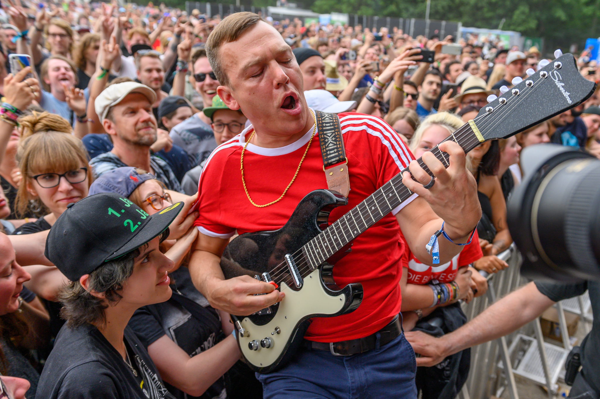 ARGO-Konzerte,Beck's Park Stage,Brad Shultz,Cage the Elephant,Konzert,Livekonzert,Livemusik,Musik,RiP,Rock im Park 2019